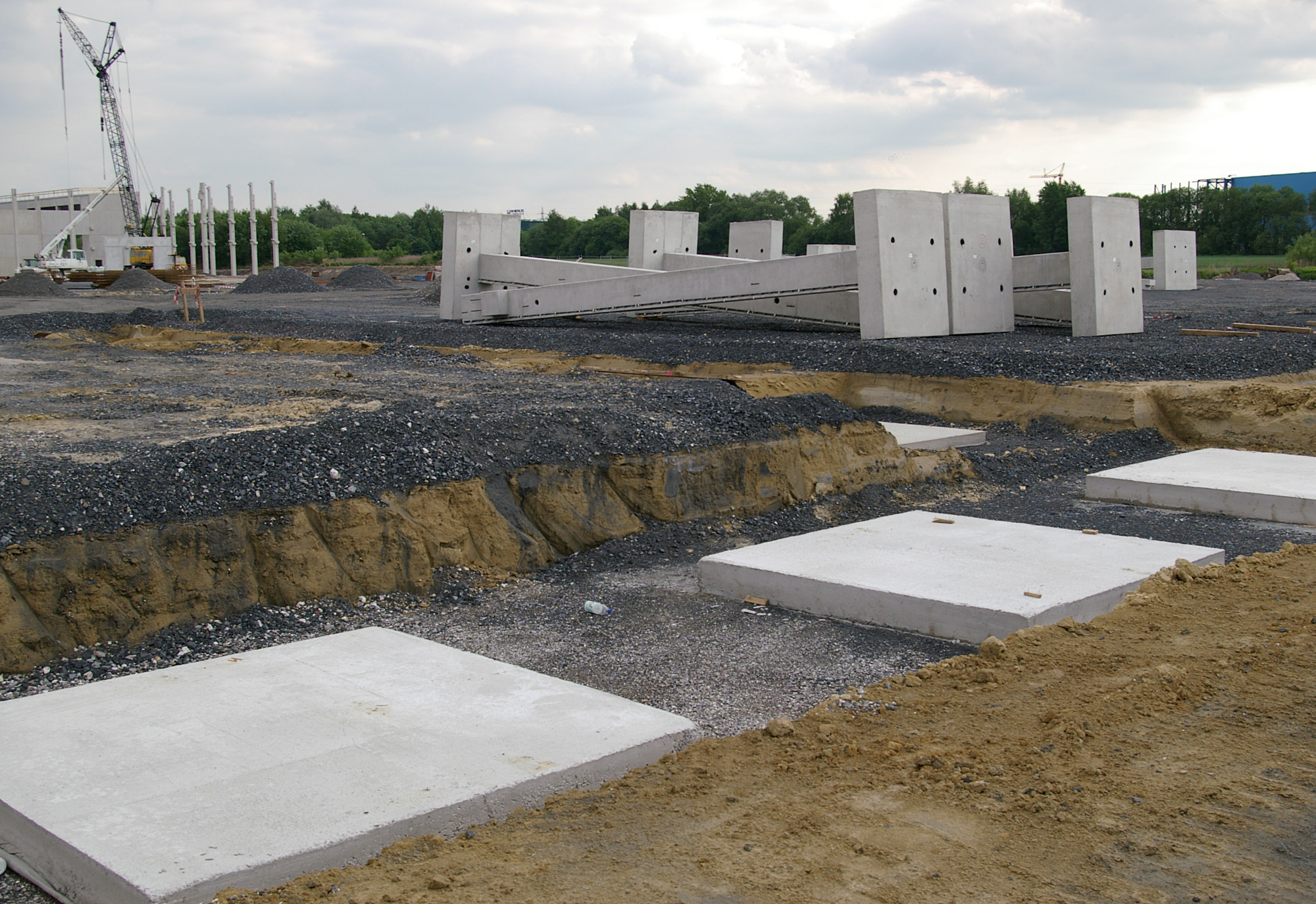 Fundamente und Beton-Fertigteile für den Bau einer Lagerhalle in Unna, Nordrhein-Westfalen